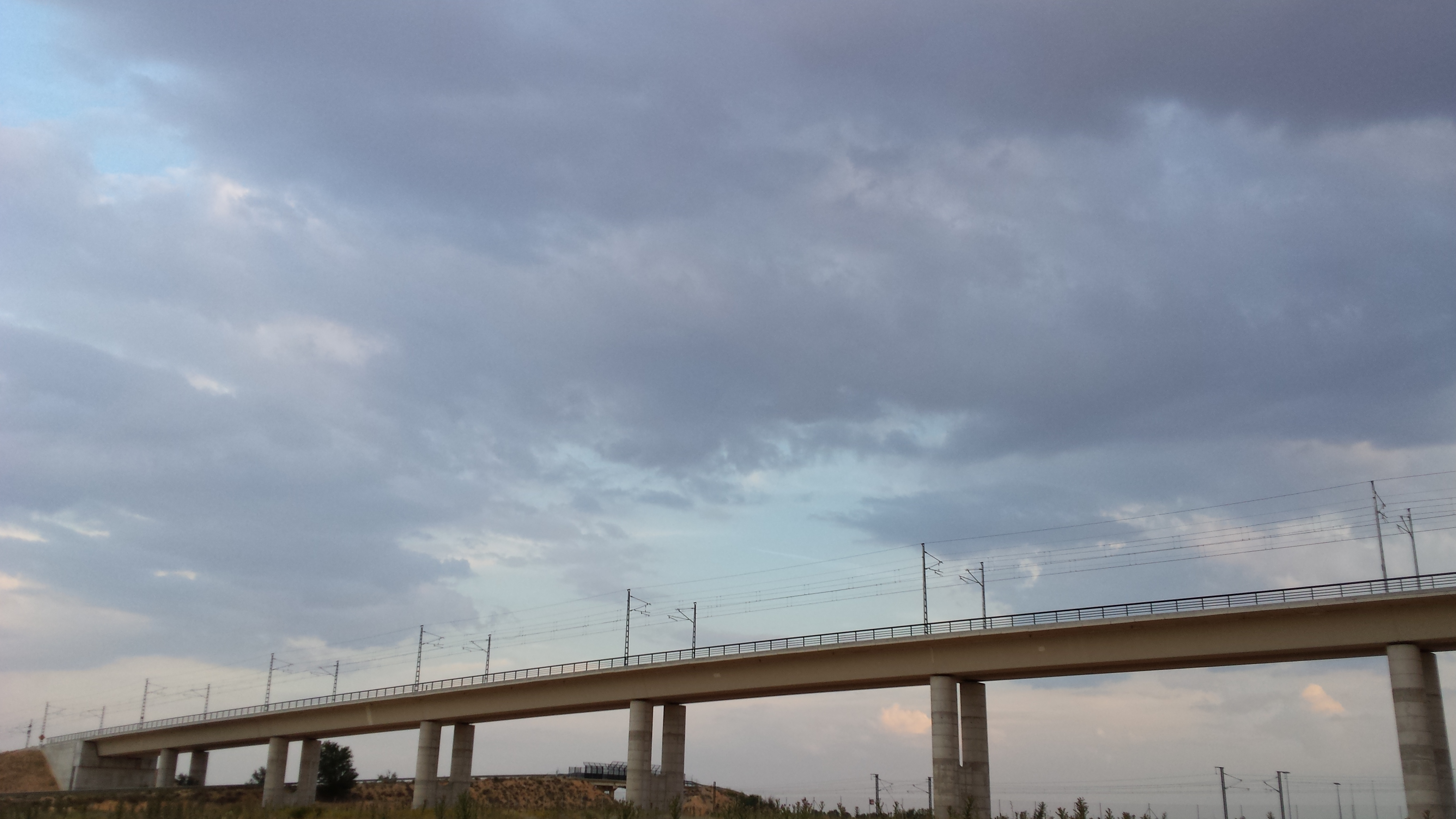 Viaducto José Antonio Lara de 562 m de longitud al sureste de la ciudad de Albacete. Albacete